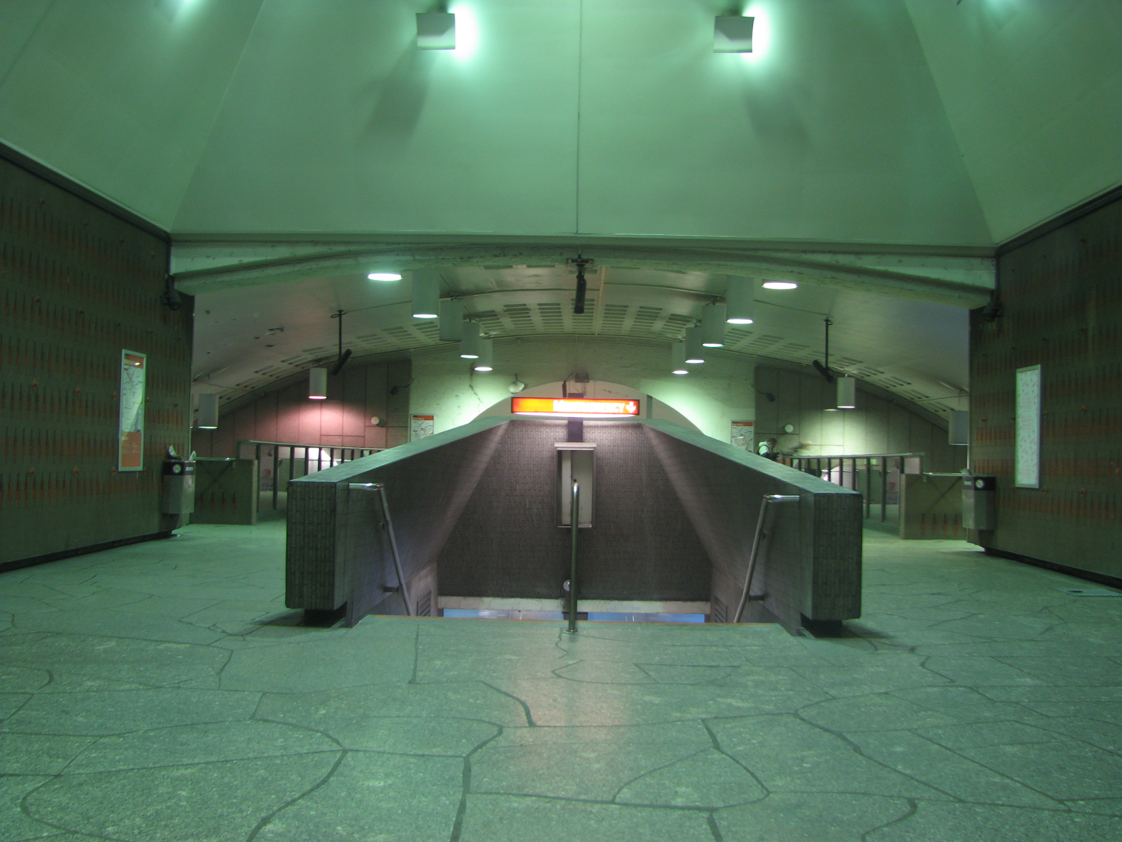 Intérieur de la station de métro Beaubien (Montréal, Québec)